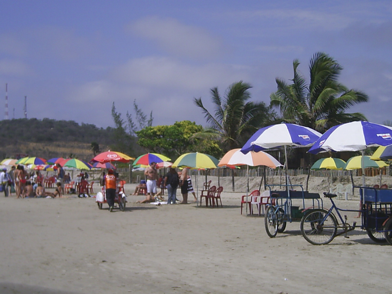 Pertenece a mis vacaciones en Montanita en el verano 2007.